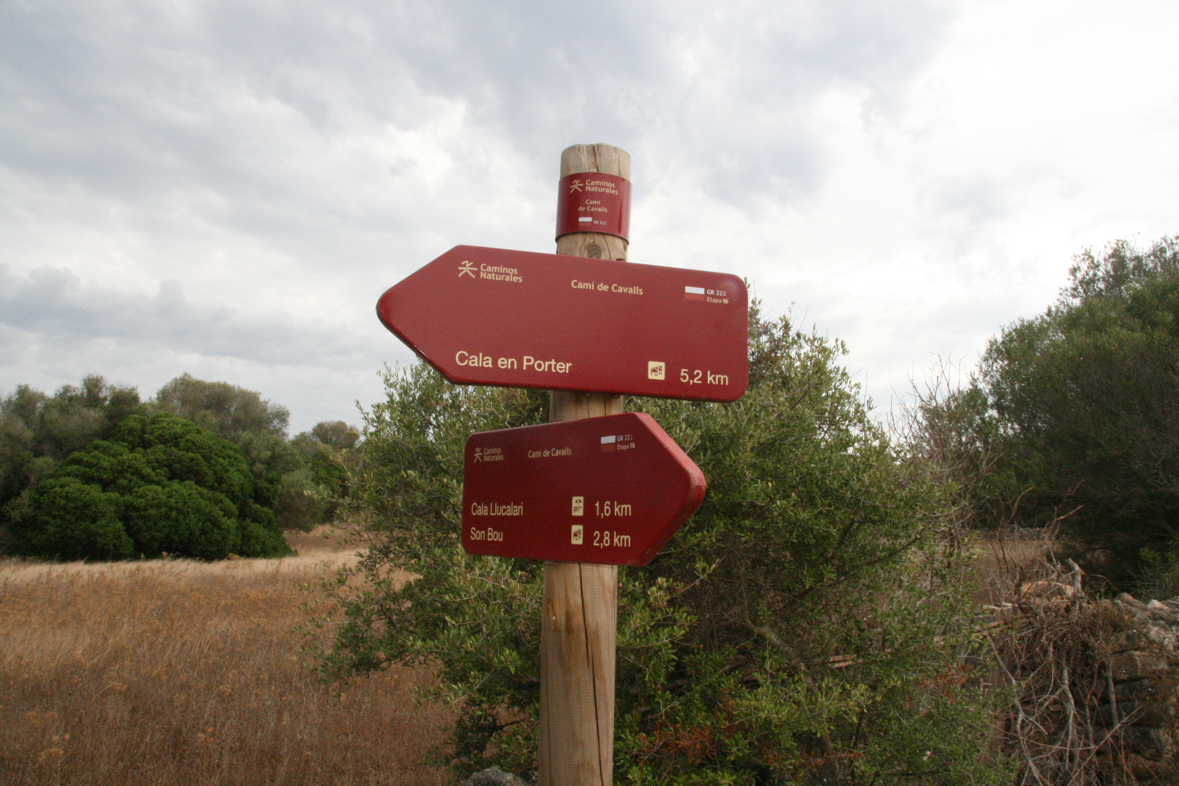 Indicador del camí de Cavalls, en el tramo 16 entre Son Bou y cala en Porter